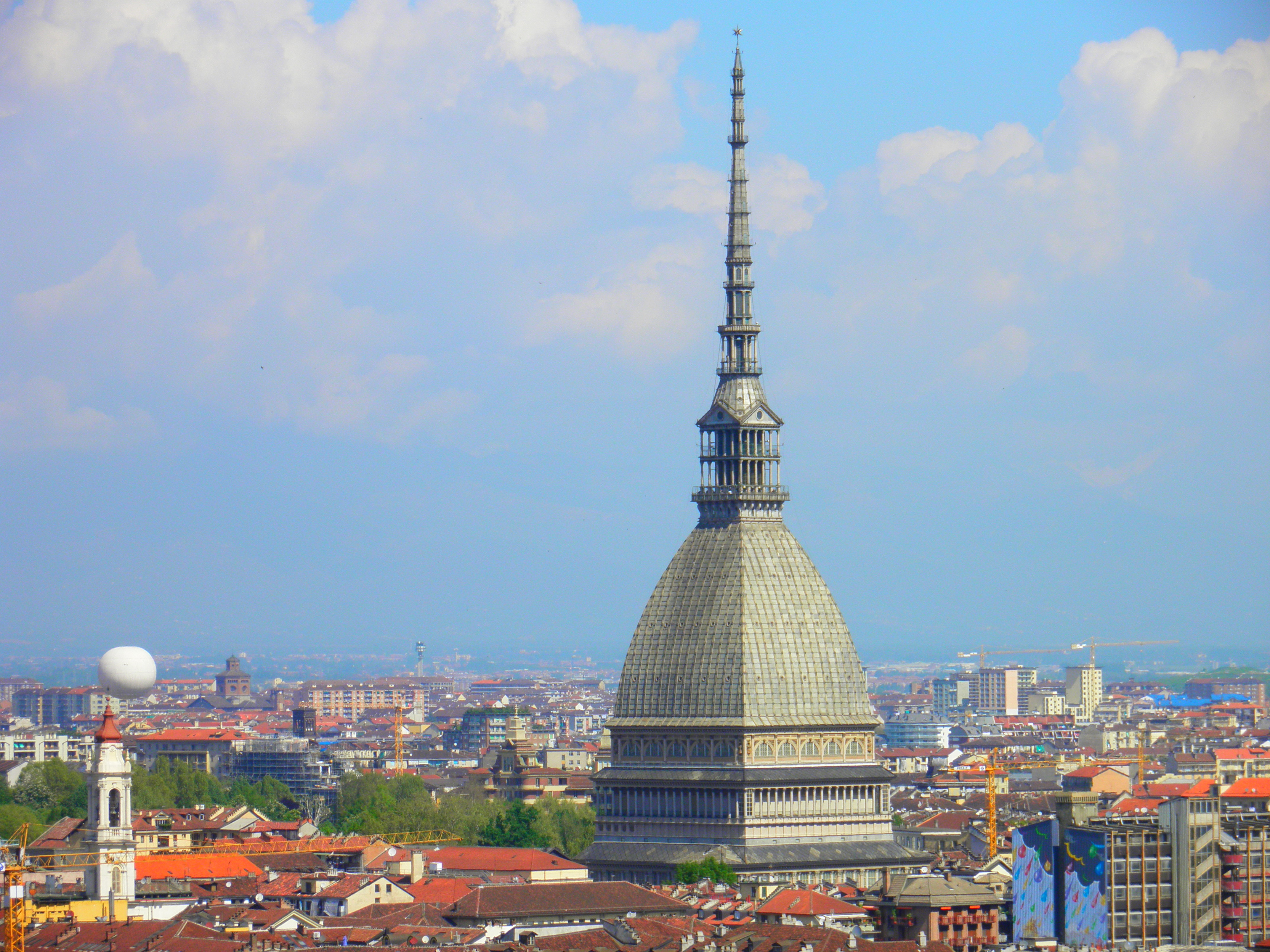 Mole Antonelliana